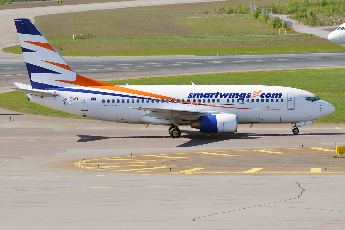 SmartWings, OK-SWT, Boeing 737-7Q8